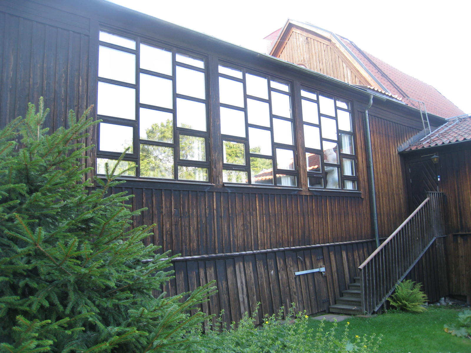 Carl Eldhs ateljémuseum, Bellevueparken, Stockholm, exteriör från öster, verkstadsateljén.